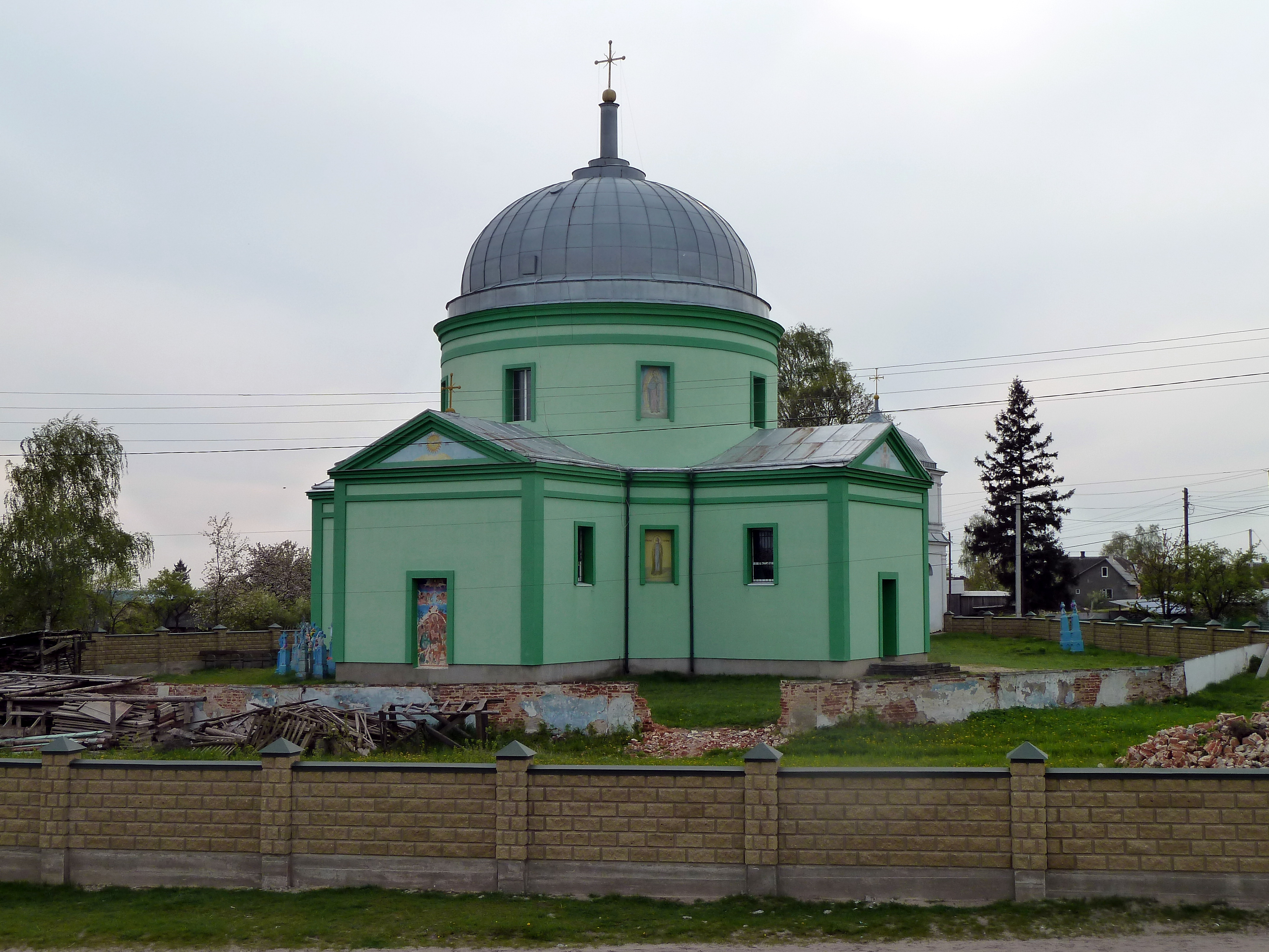 Троїцька церква (мур.) (1841 рік) - вигляд зі сходу - смт Головне Любомльський район Волинська область Україна